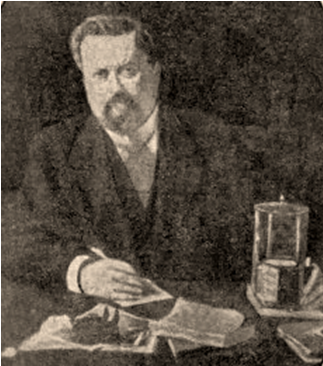 Hyppolite Baraduc